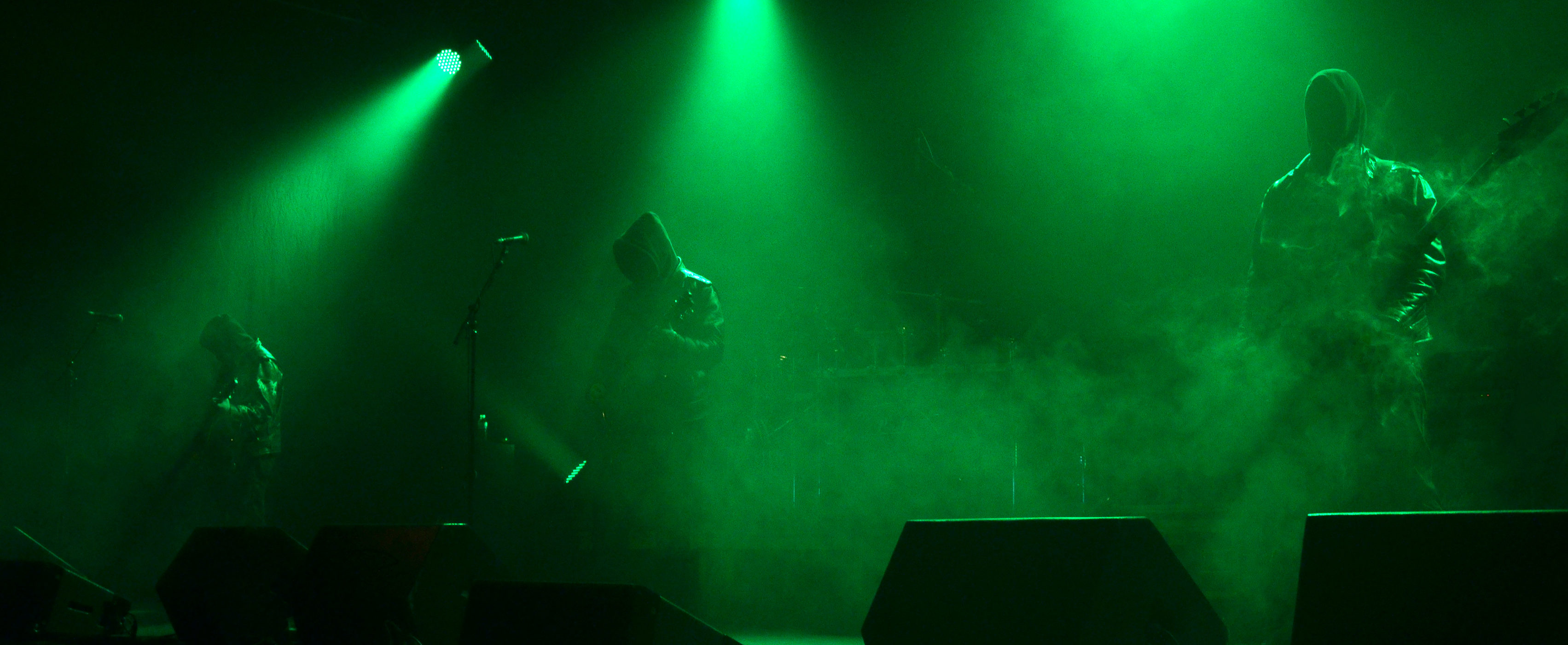 Mgła, groupe de Black Metal polonais, au Throne Fest à Kuurne, le 10 Mai 2014.